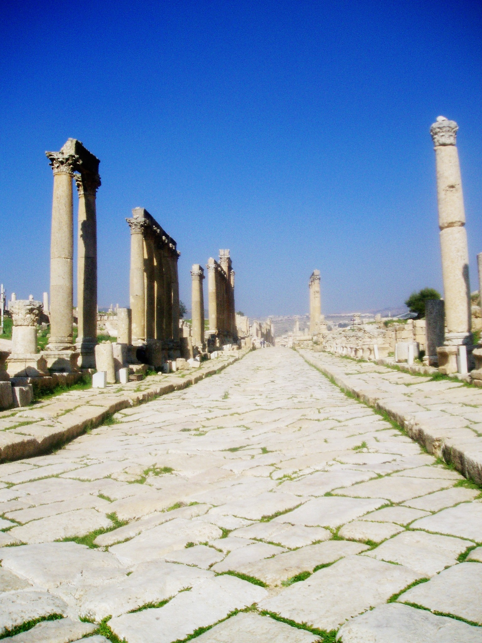 Walkway at Jerash